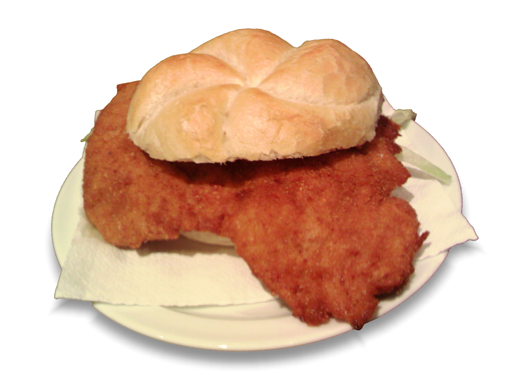 Schnitzelsemmel